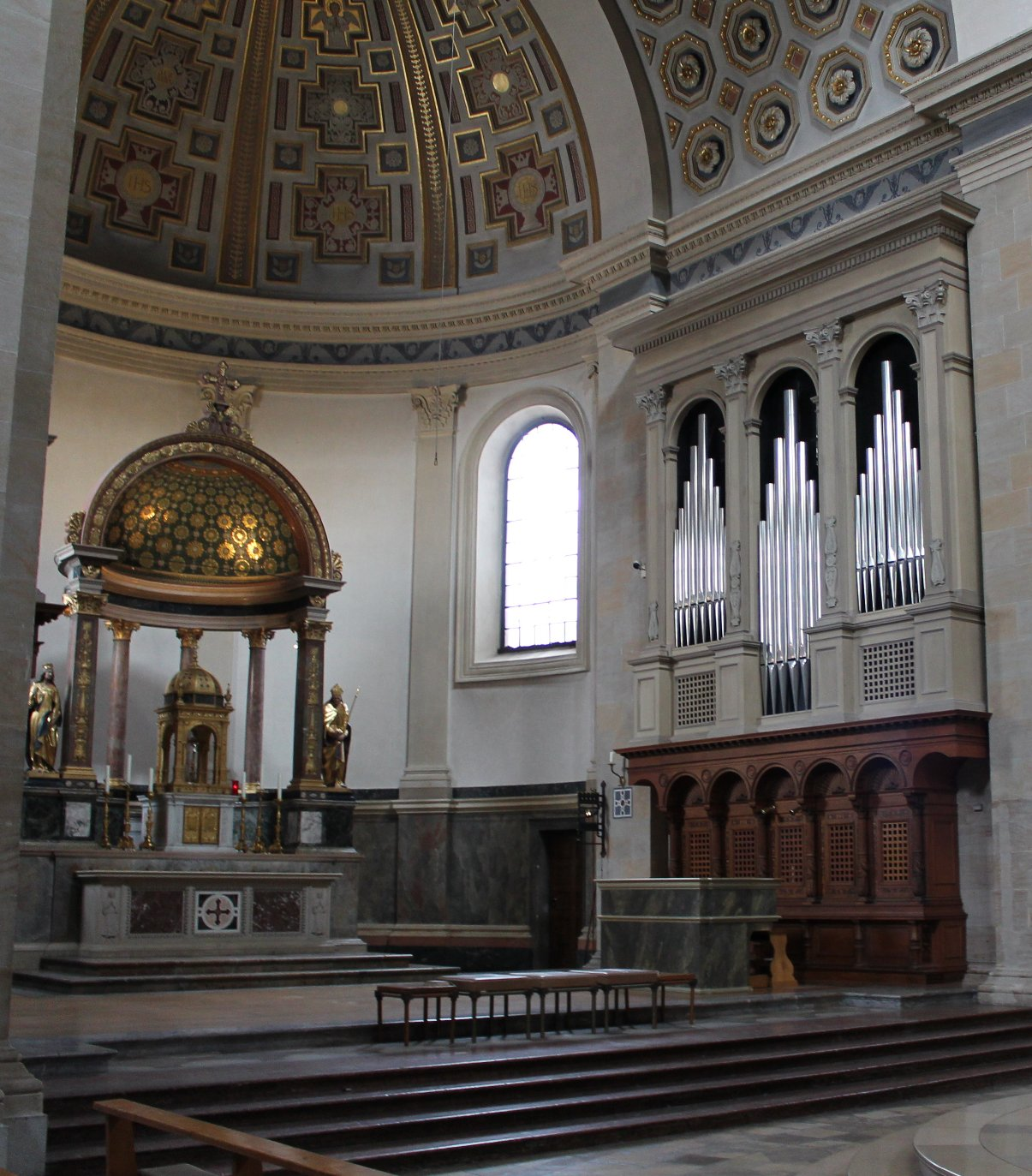 Altar und Chroorgel von St. Ursula in München